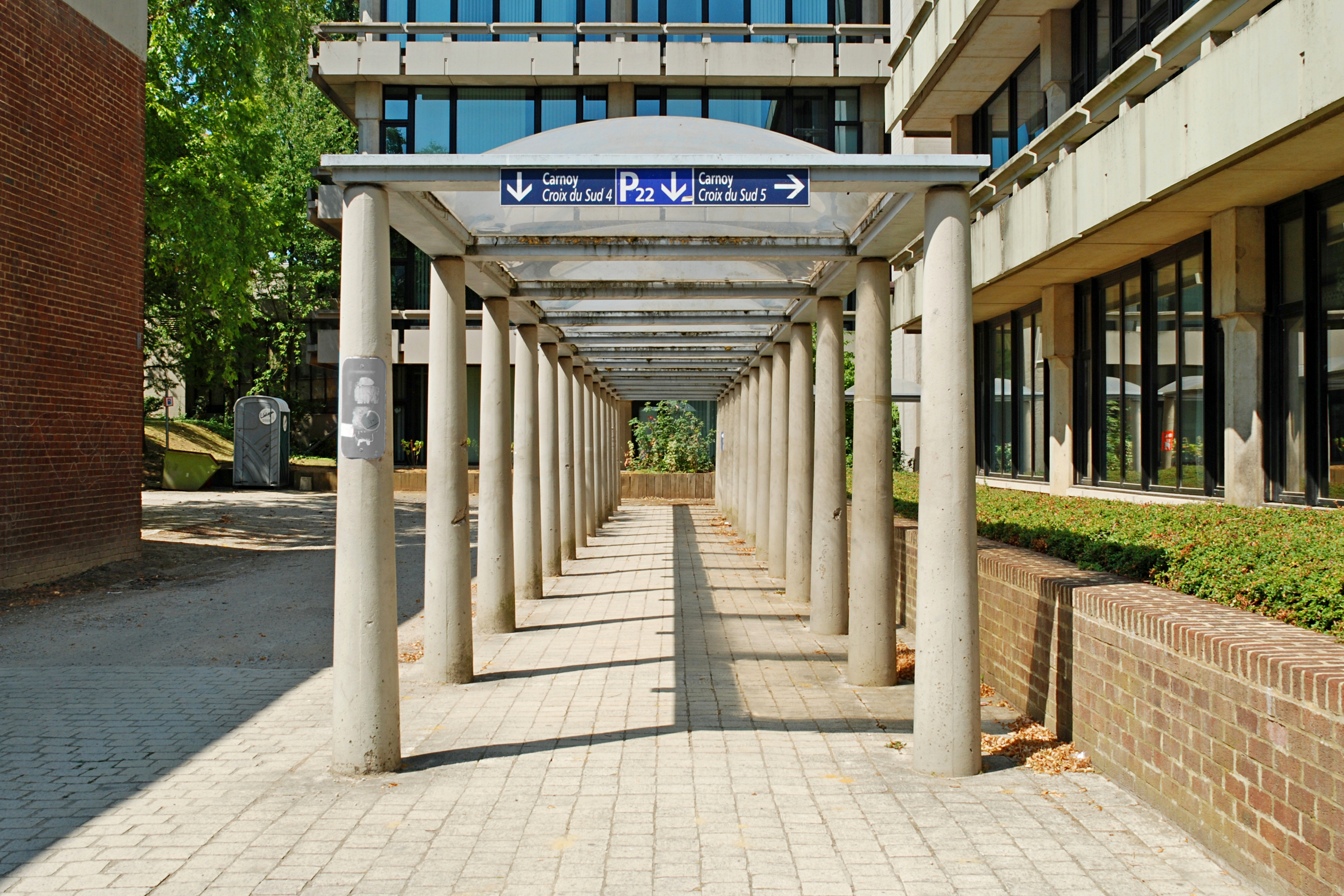 Belgique - Louvain-la-Neuve - Place Croix-du-Sud - galeries couvertes This photo of immovable heritage has been taken in the Walloon Region